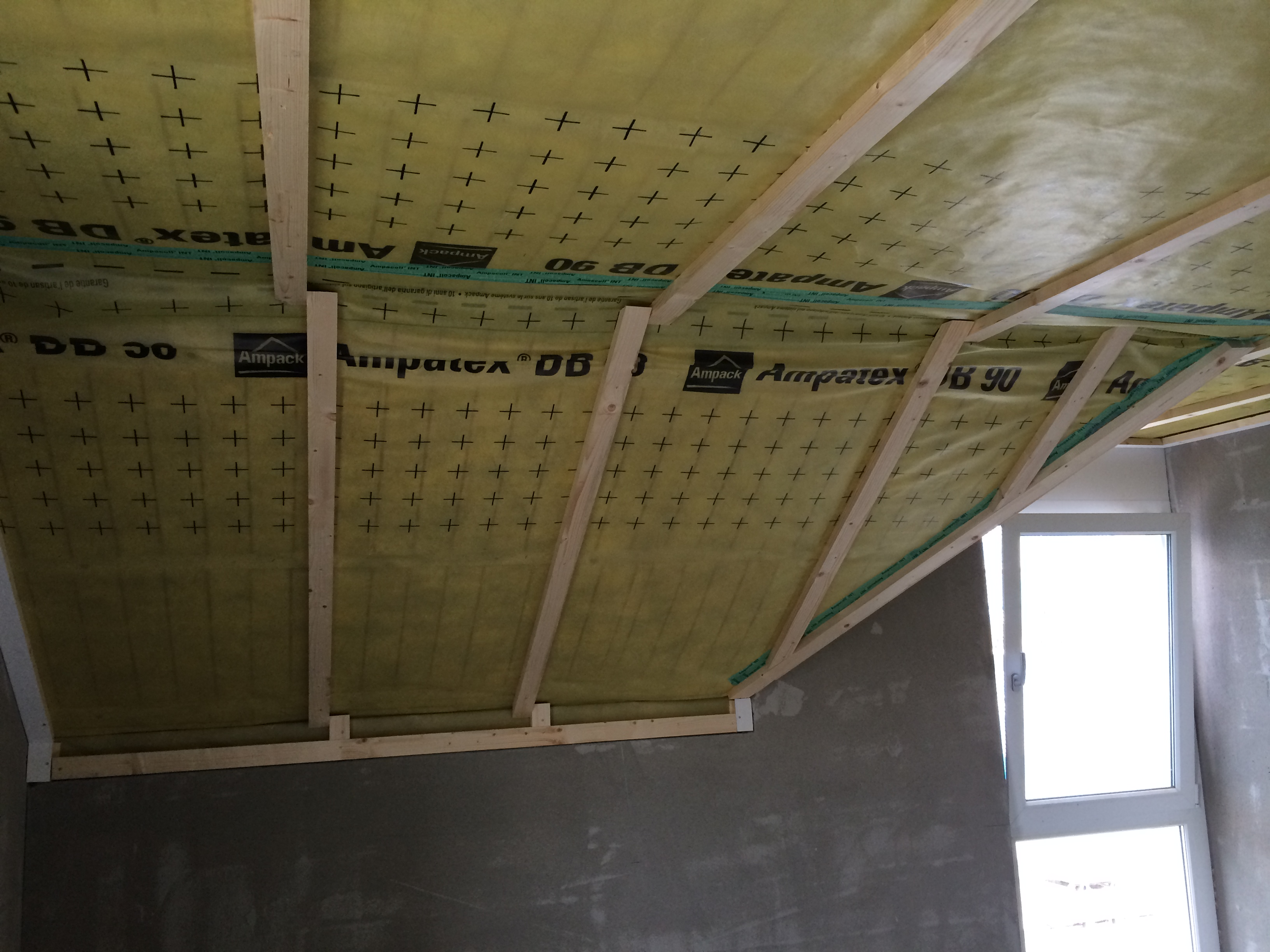 Verlegte Dampfbremse im Neubau